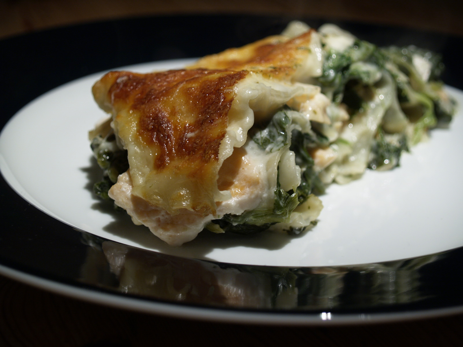 Lasagne med laks og spinat